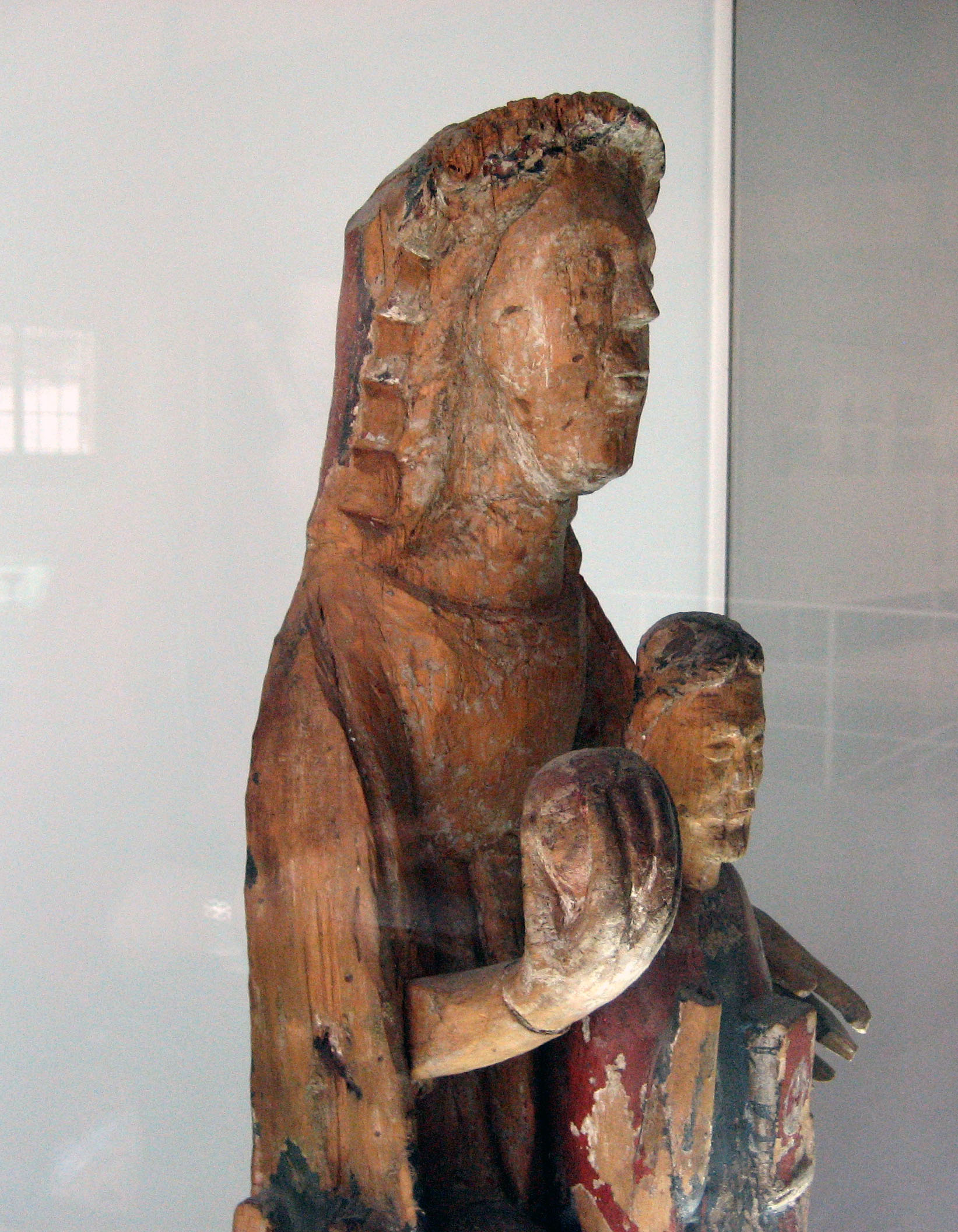 Mare de Déu de Cortscastell siglo XII de la comarca catalana del Pallars Sobirà (Spain)